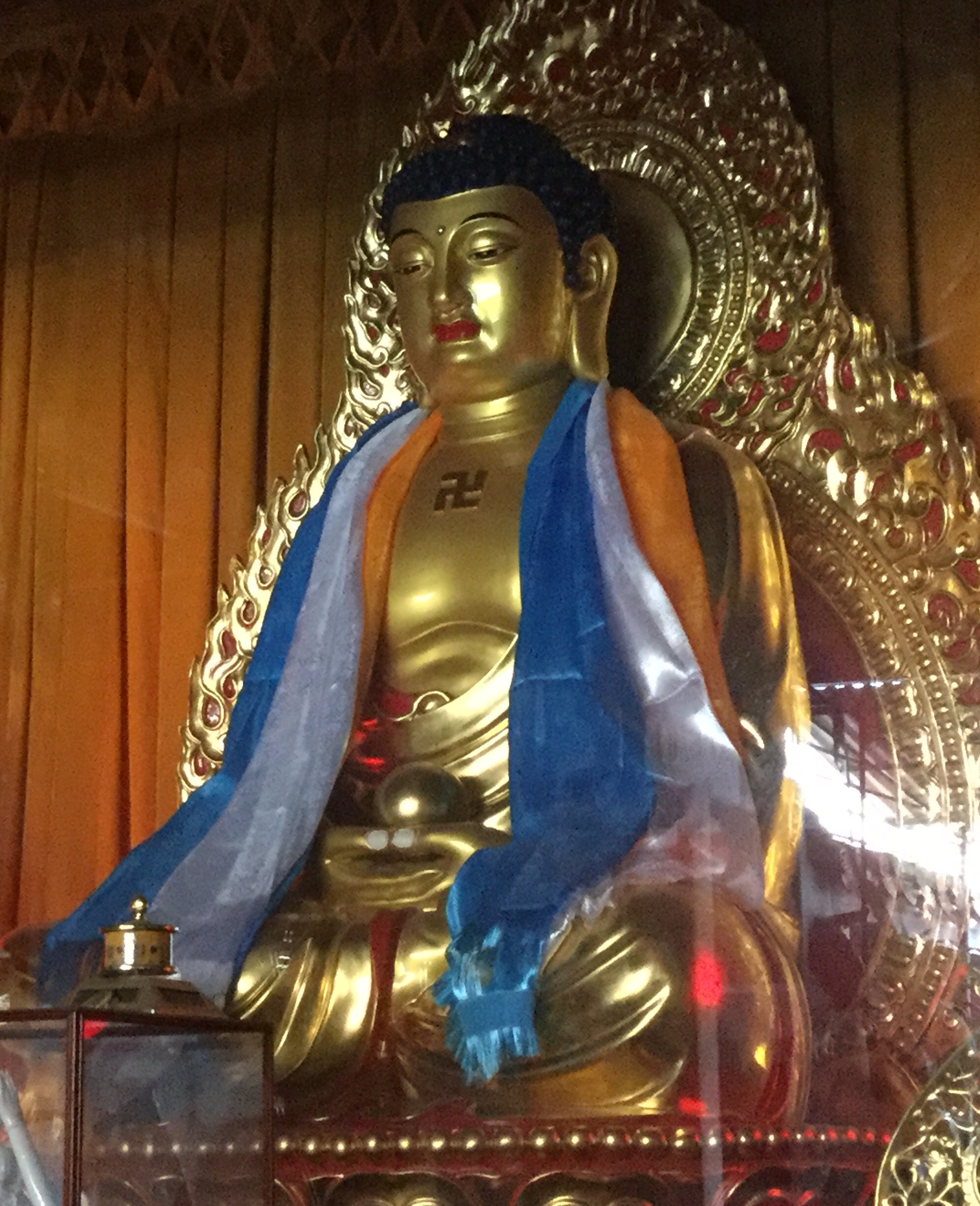 释迦牟尼佛